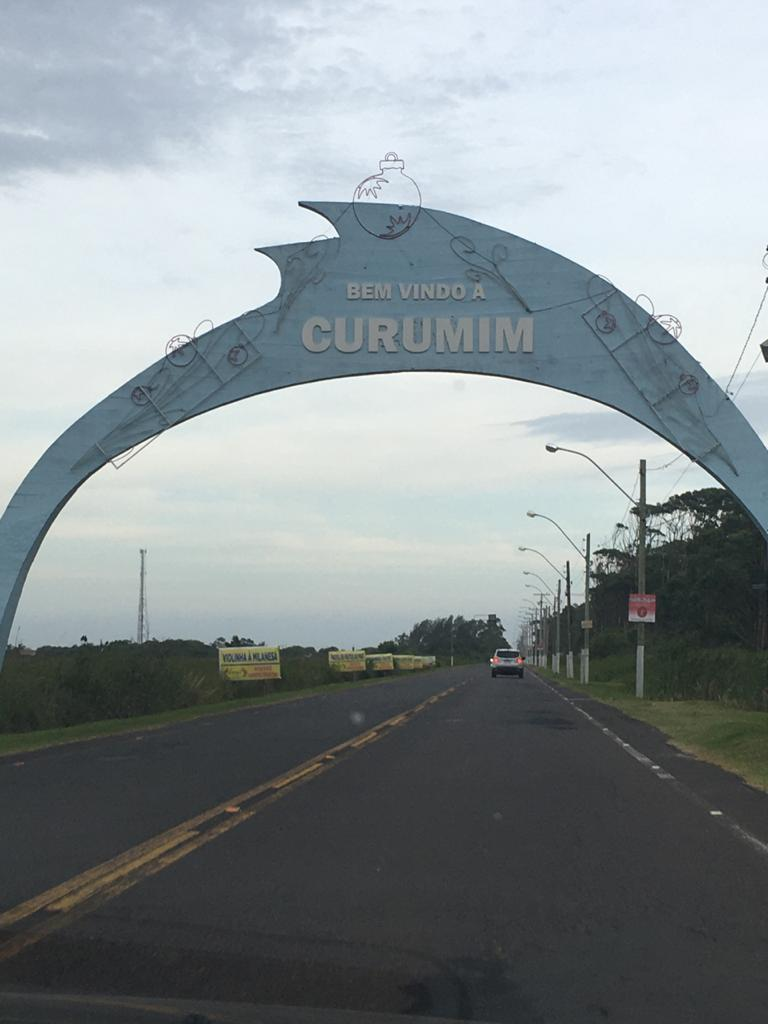 Curumim, Capão da Canoa em dezembro de 2019.